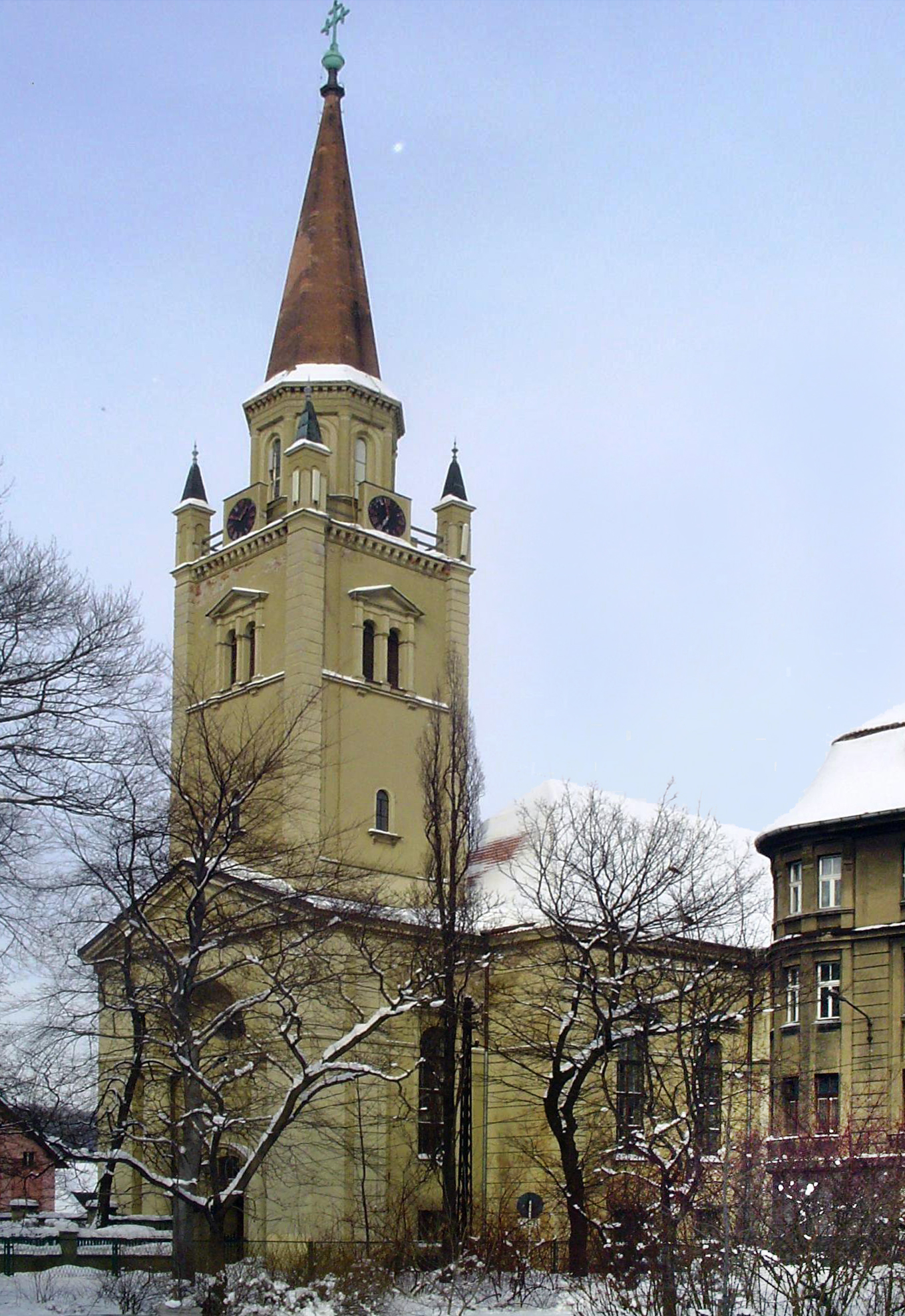 kościół ewangelicki, 1785-88 Wałbrzych, pl. Kościelny